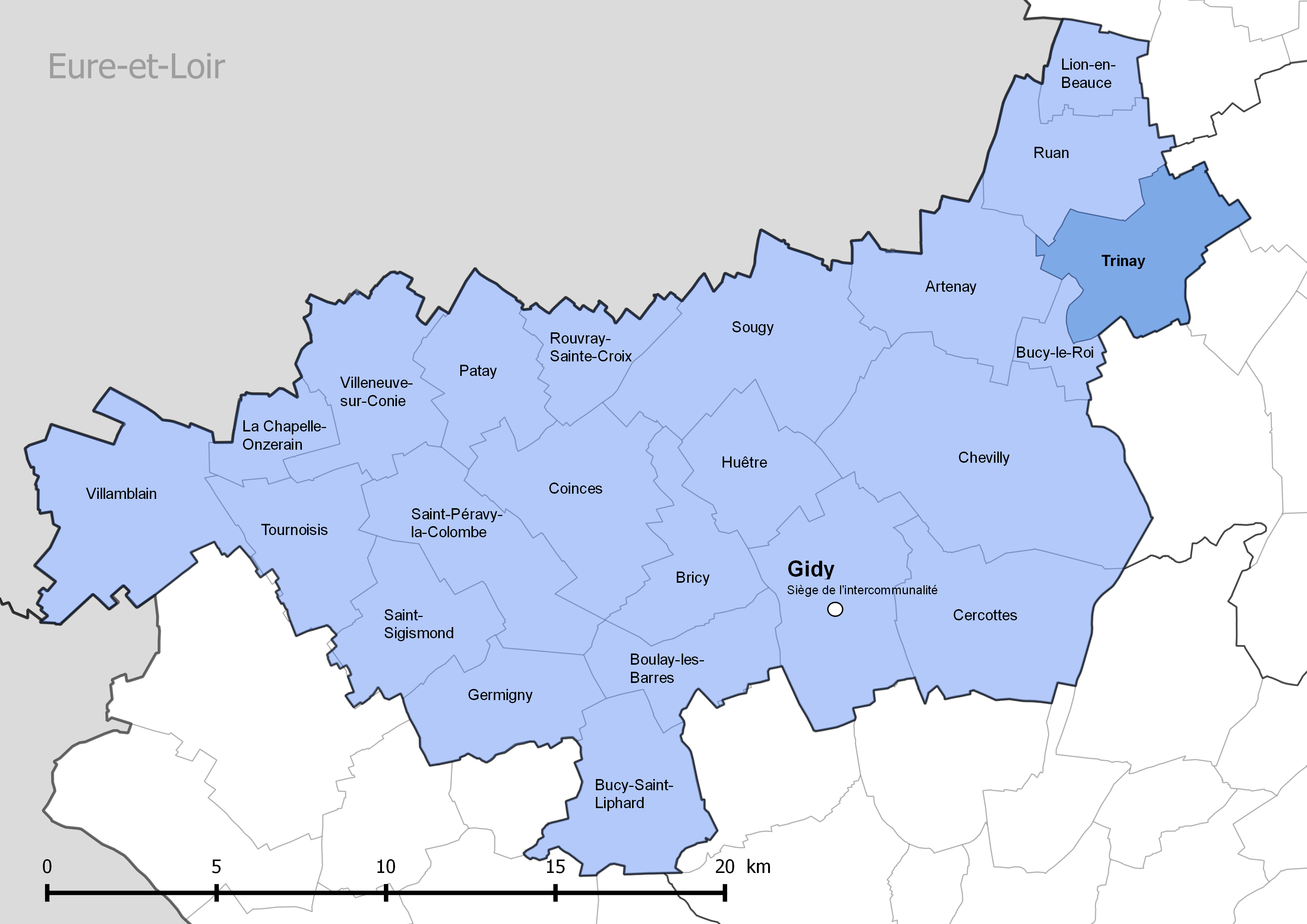 Périmètre de la communauté de communes de la Beauce loirétaine - Situation de la commune de Trinay